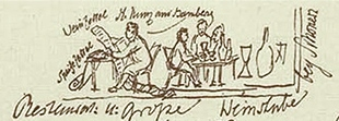 Ausschnitt aus dem Kunzschen Riss, den E. T. A. Hoffmann 1815 an seinen Bamberger Verleger Kunz schickte